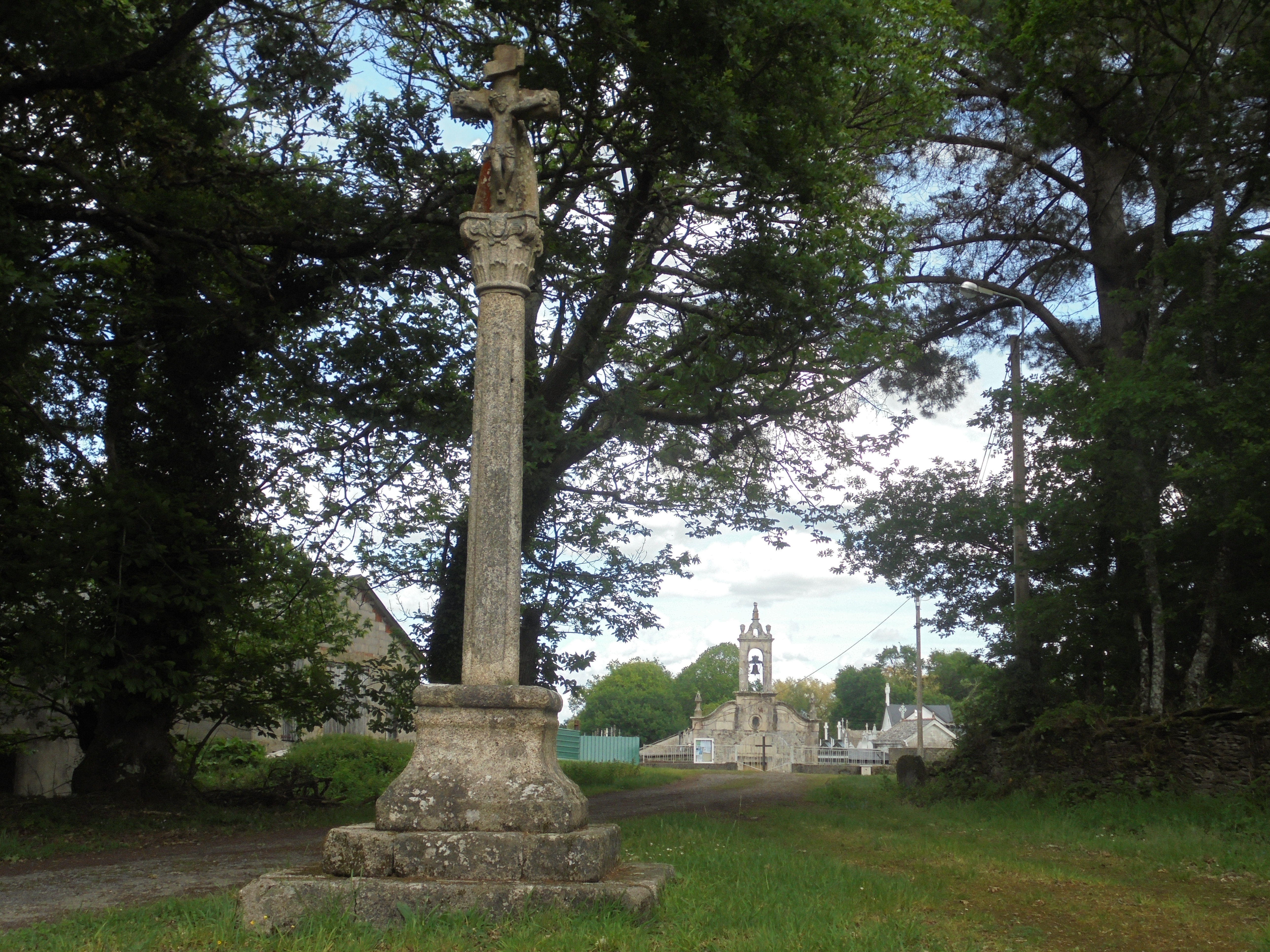 Cruceiro e igrexa parroquial de Caboi ( Outeiro de Rei)